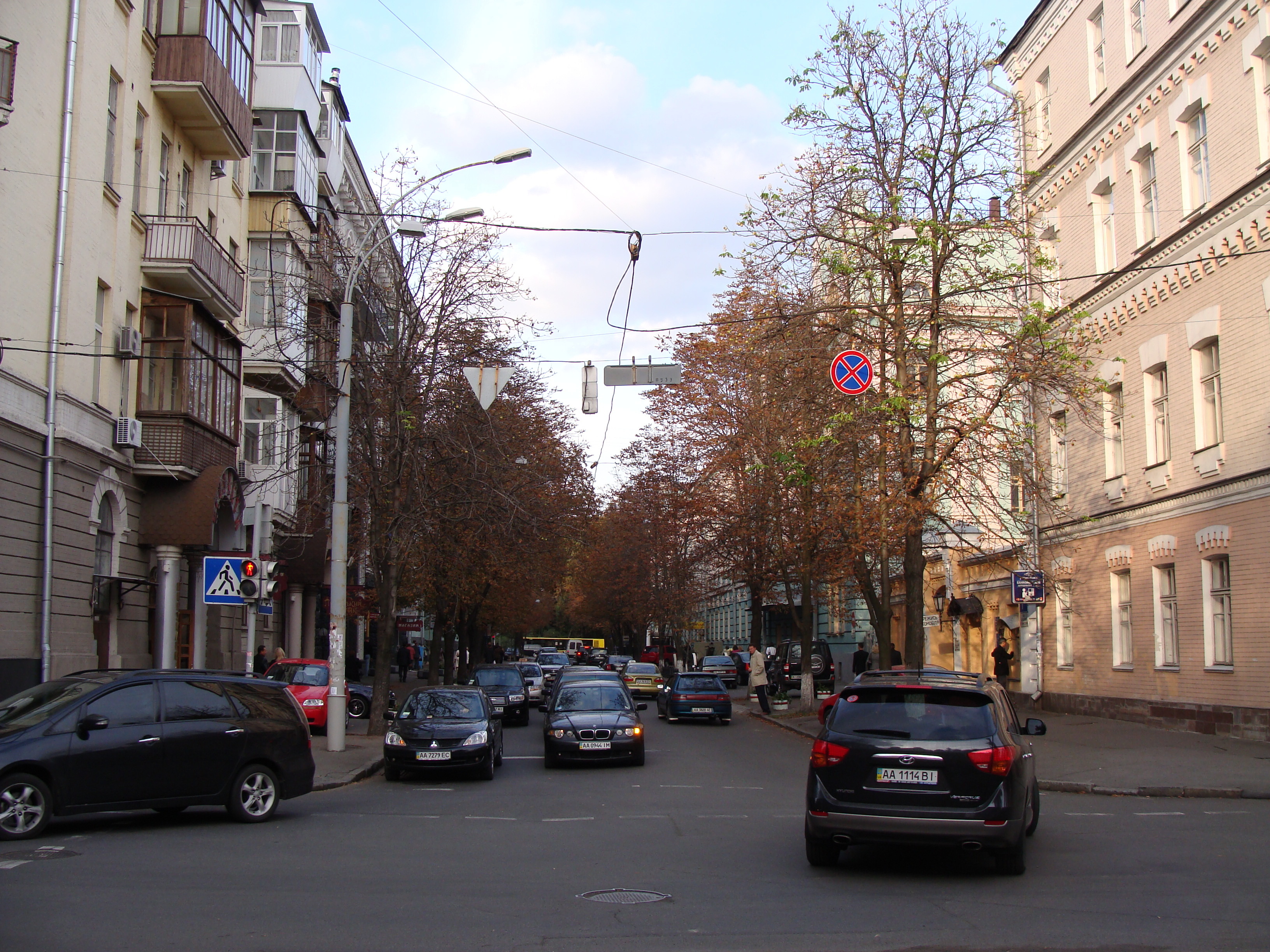 Провулок Кріпосний, Київ